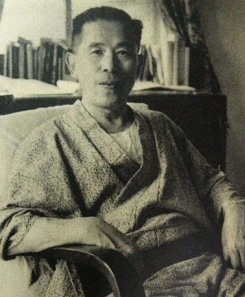 北岡寿逸（経済学者、国学院大教授） 1947年、東宝取締役として大量解雇を実施し、東宝争議をひき起こされる。